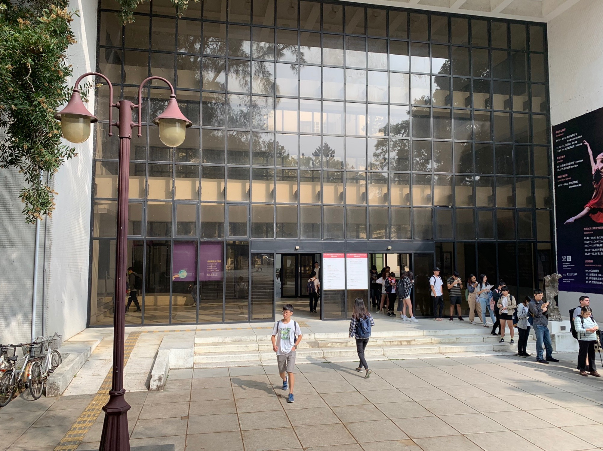 國立清華大學第二綜合大樓前（右側為等待校車學生）。